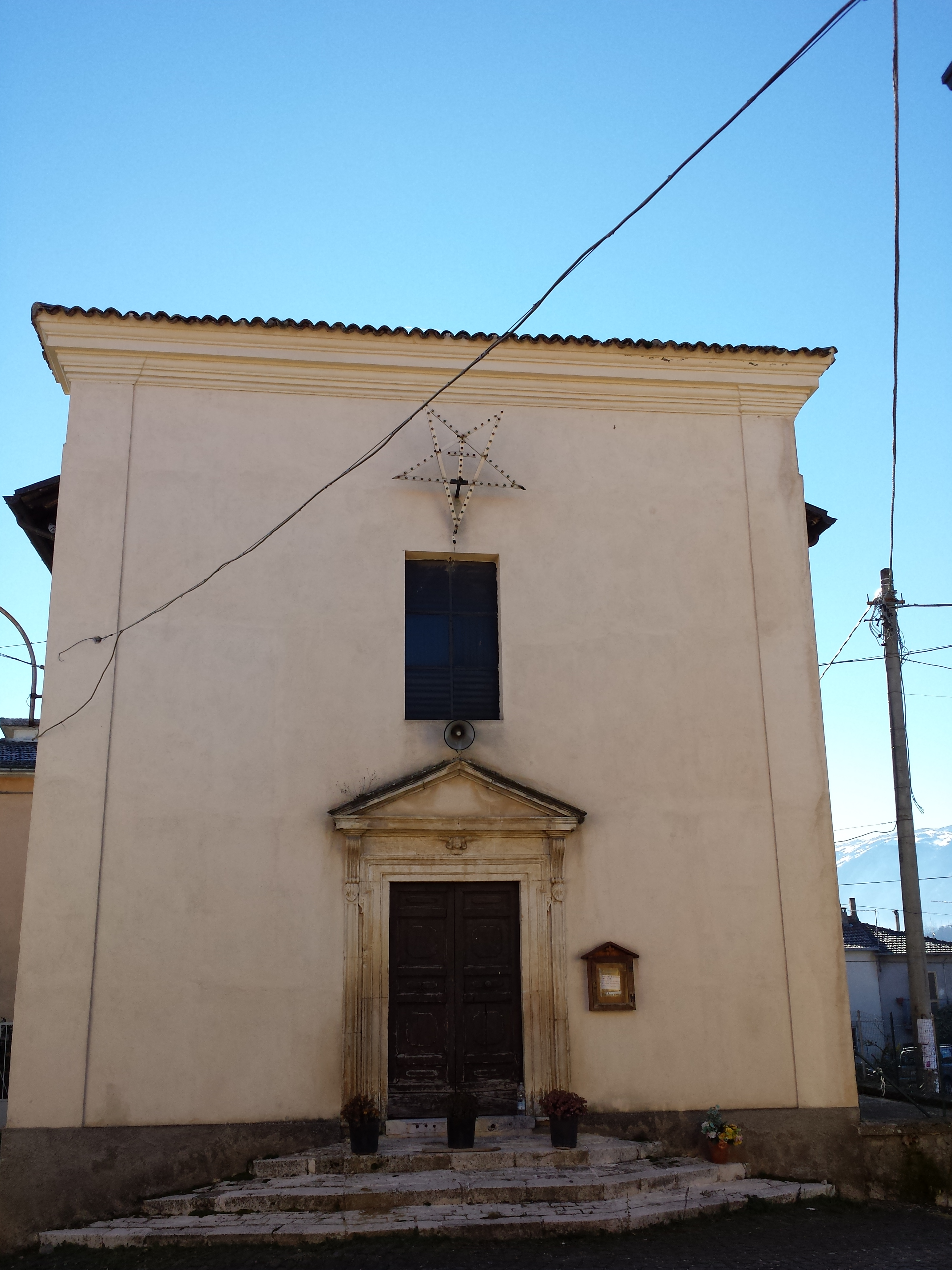 Chiesa di Sant'Antonio - Colle di Sassa (L'Aquila)